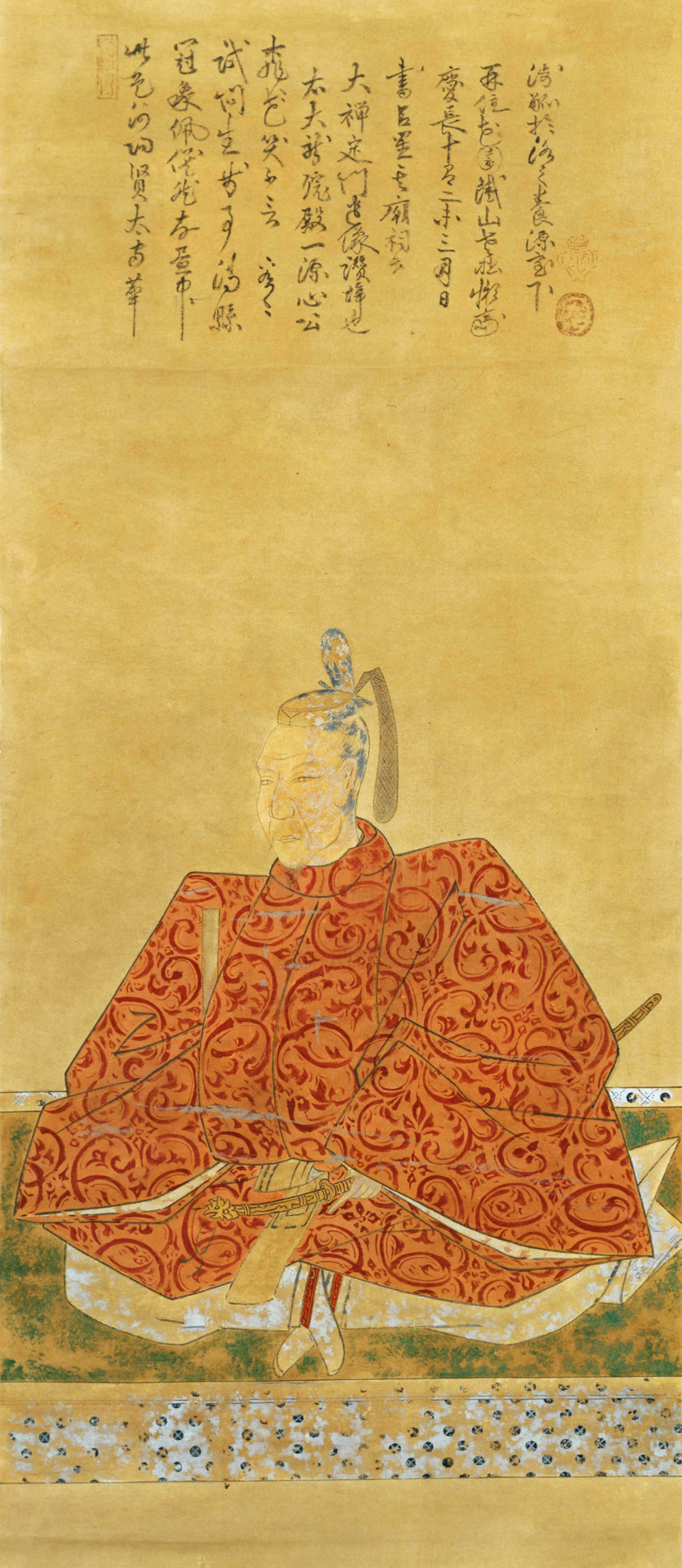 Kazuzi Nakamura